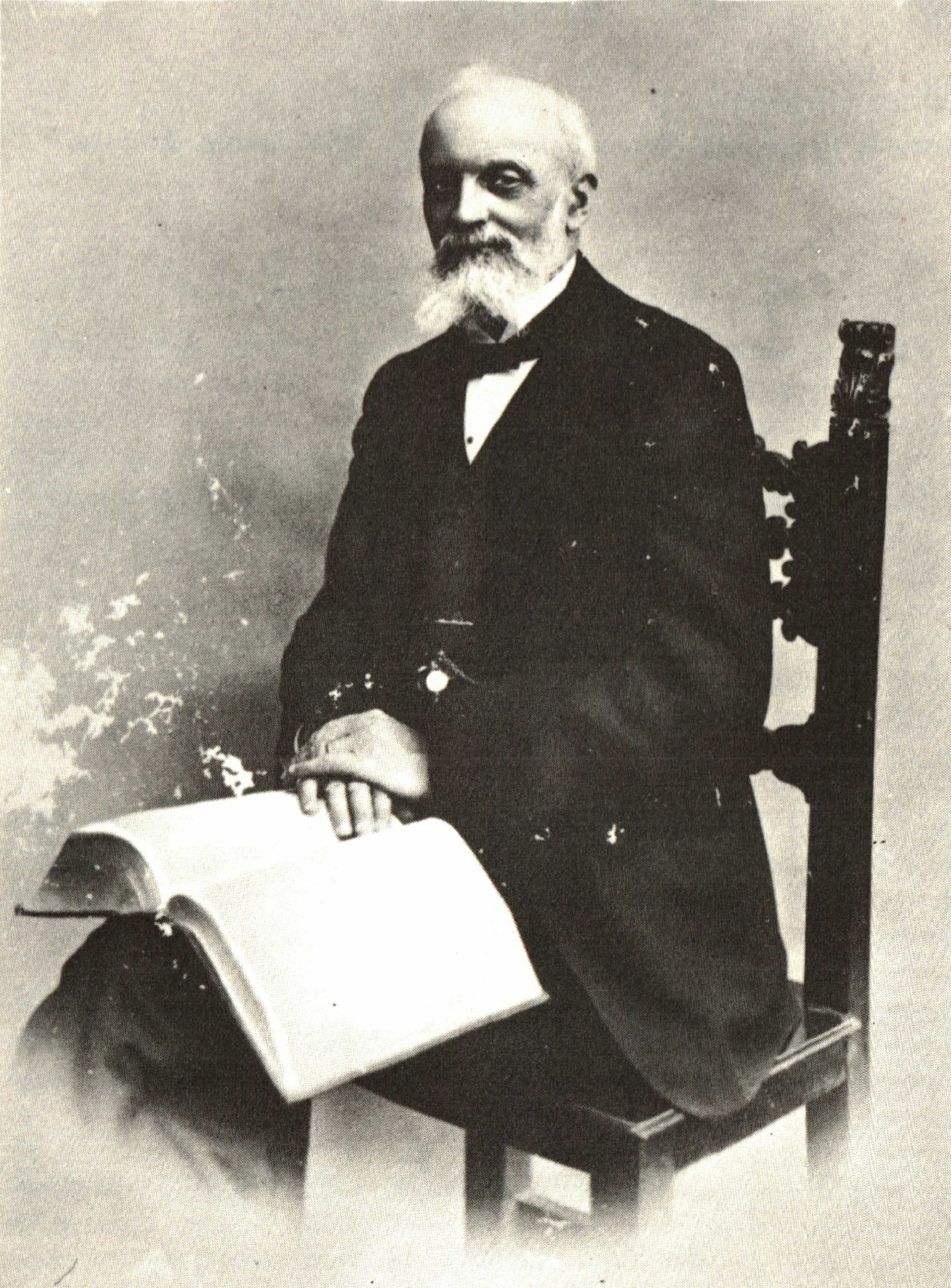 Pier Desiderio Pasolini